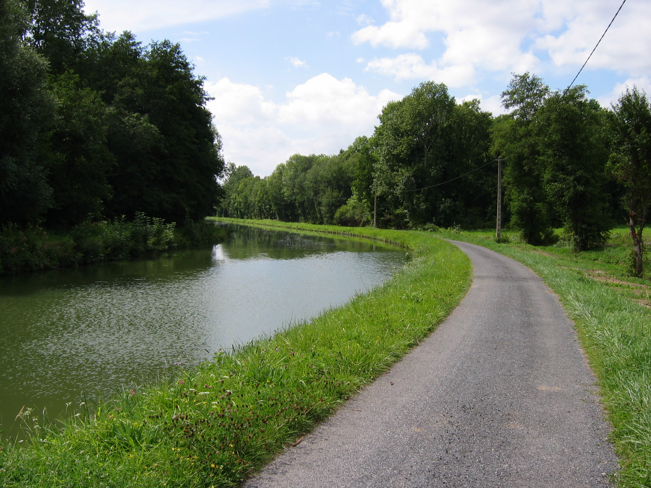 Canal des Ardennes France chemin de halage